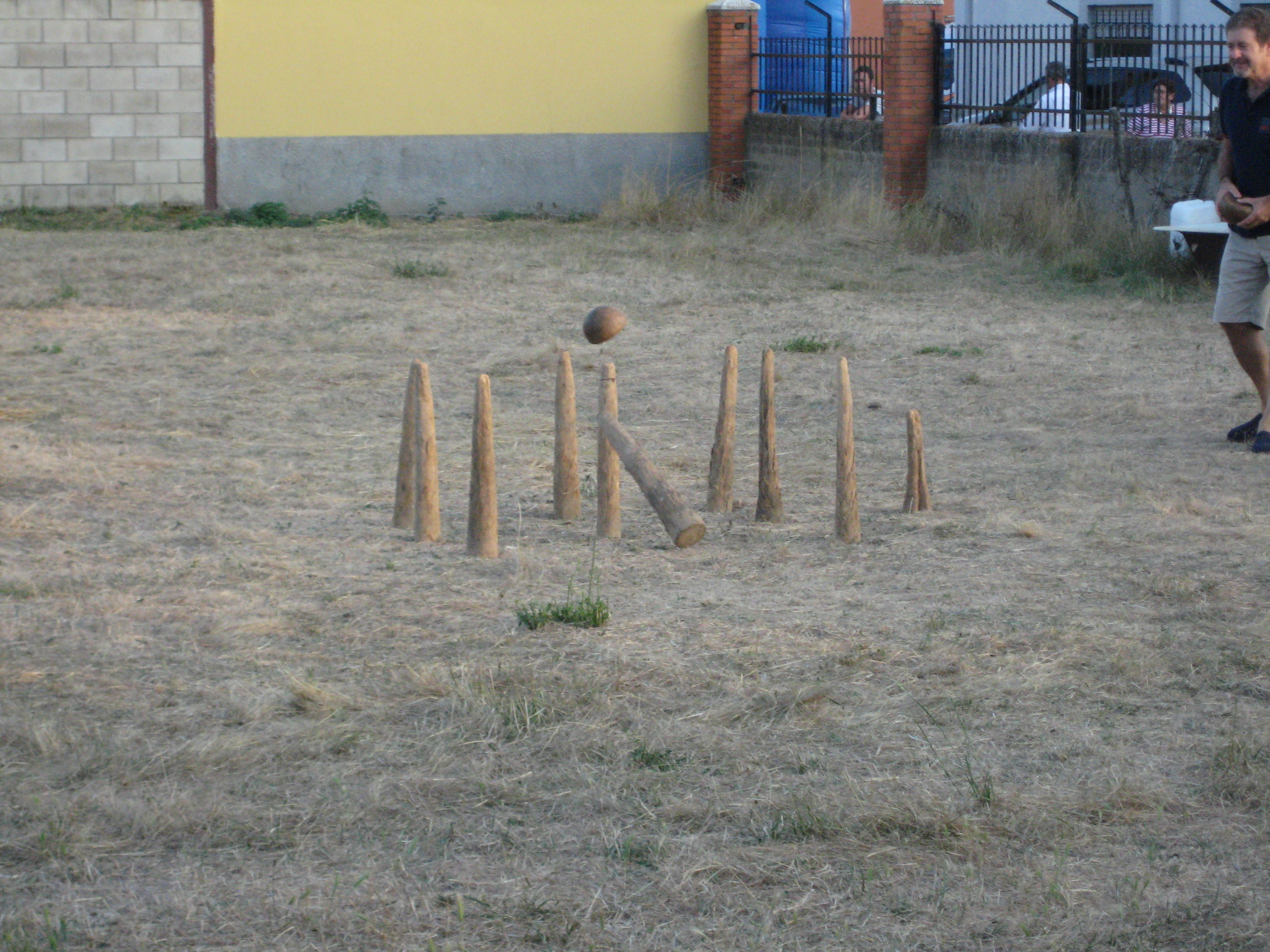 Bolera15Julio2013